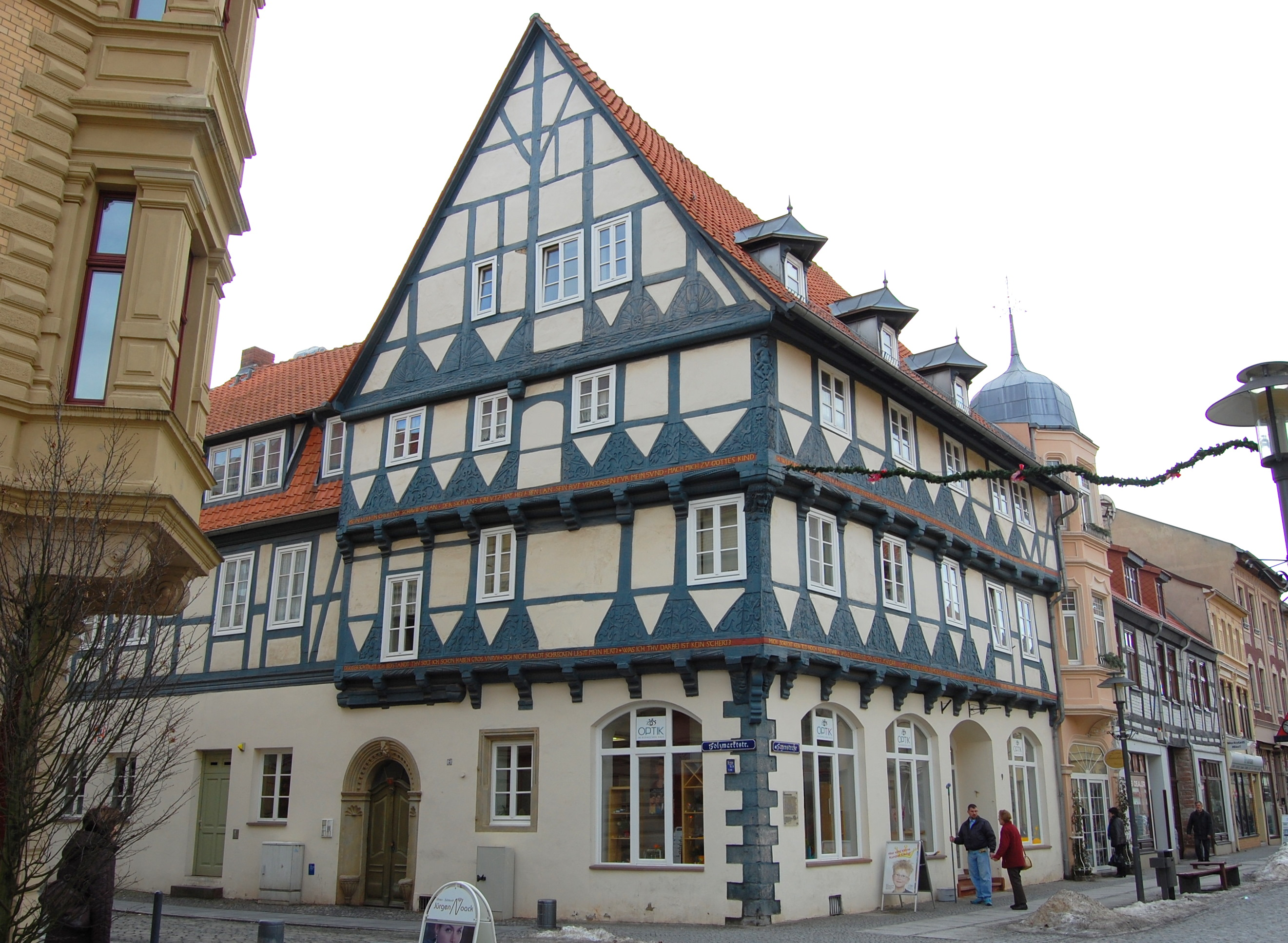 Kühnsches Haus in Haldensleben